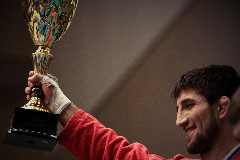 Мирзаев Расул 26.02.2011 Россия, Санкт-Петербург Чемпионат России по боевому самбо 2011 Russia, St. Petersburg Russian Combat Sambo Championship 2011